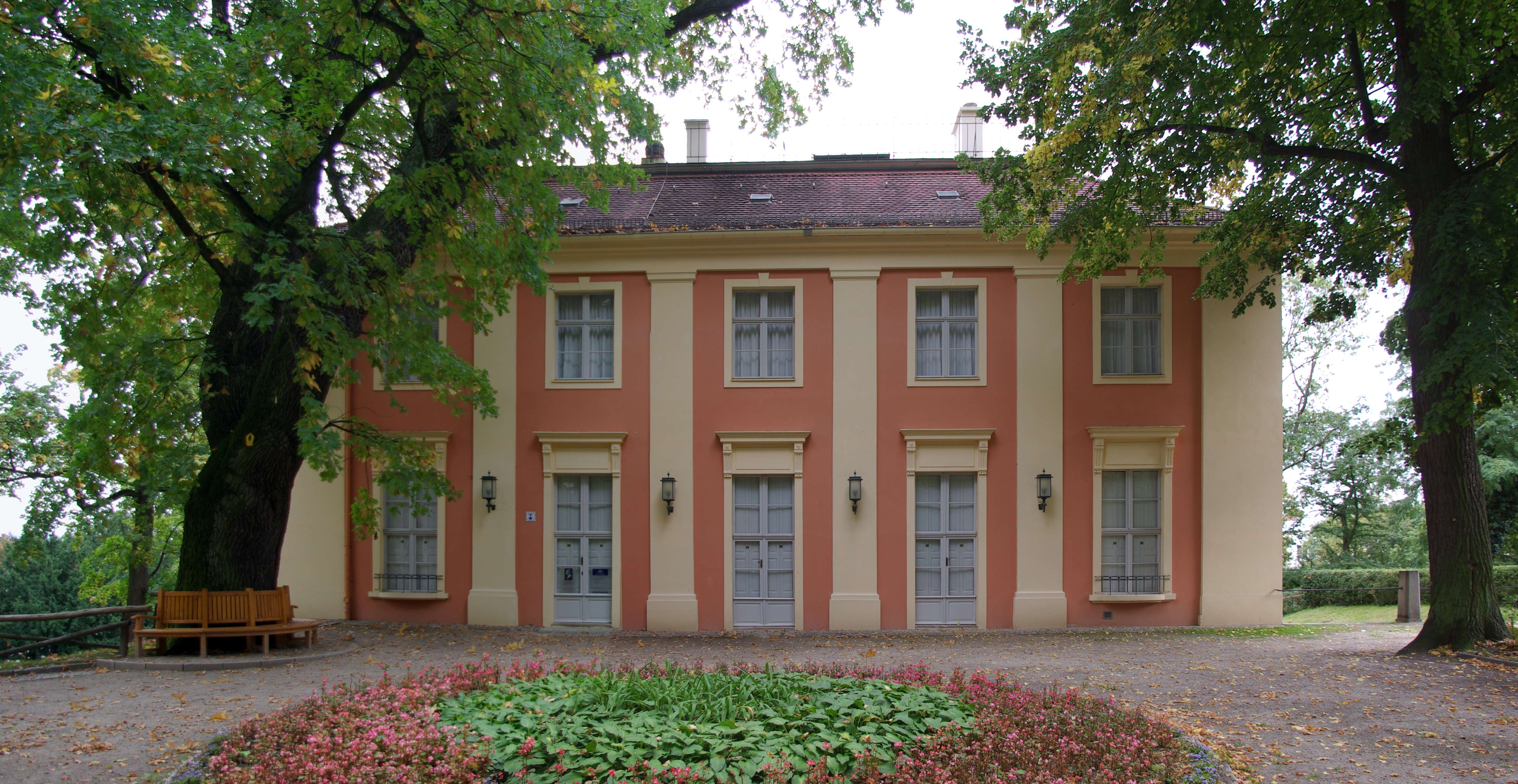 Bad Freienwalde in Brandenburg. Das Schloss steht unter Denkmalschutz. Hier befindet sich ein Rathenau-Gedenkstätte.